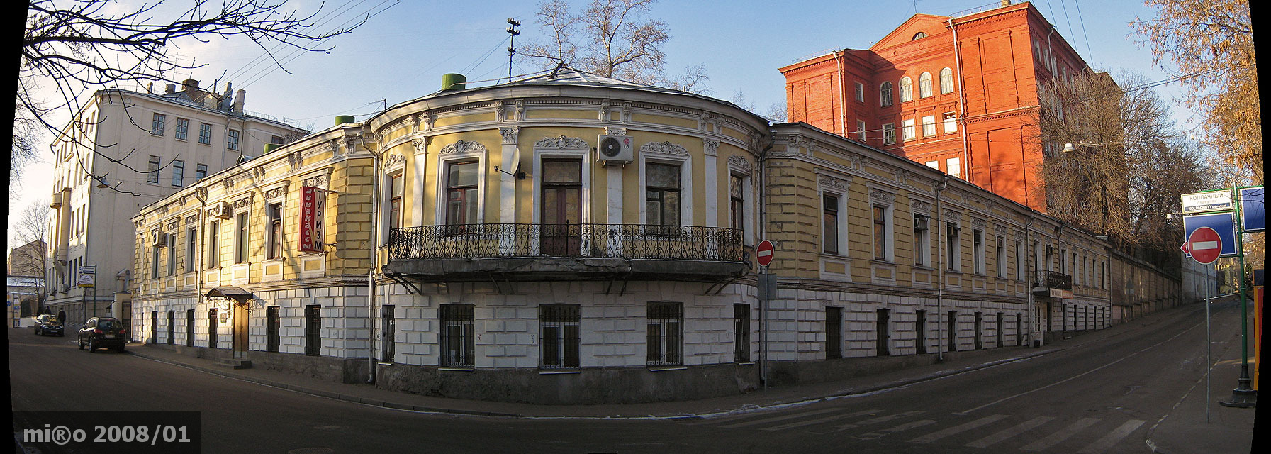 Перекресток переулков Хохловского] и Колпачного (2008/01/08)